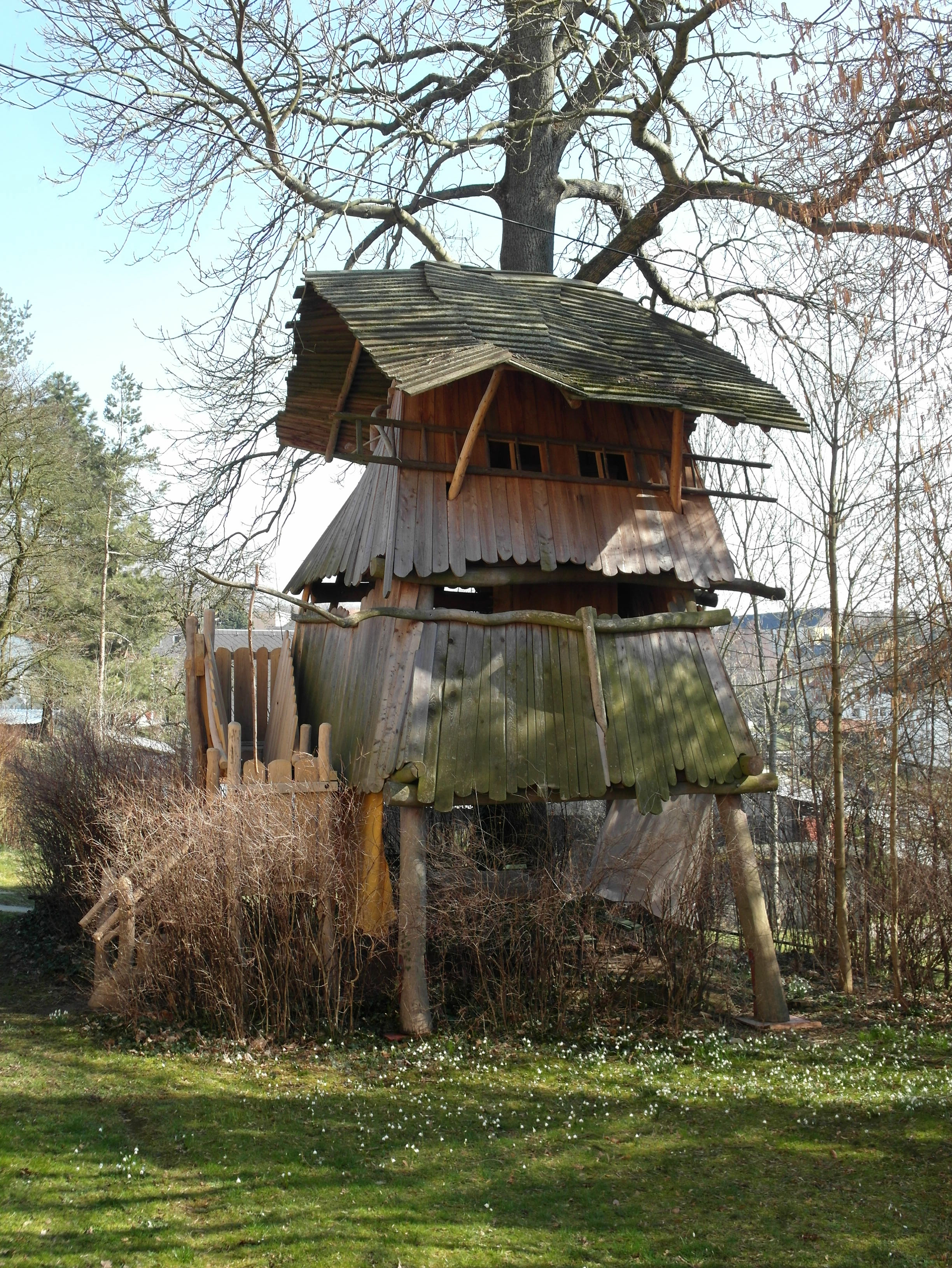 16.03.2016 01833 Langenwolmsdorf (Stolpen): Baumhaus, Kinderspielhaus auf dem Pfarrhausgrundstück Bergstraße 7 (GMP: 51.042432,14.117393). [SAM3669.JPG]20160316375DR.JPG(c)Blobelt